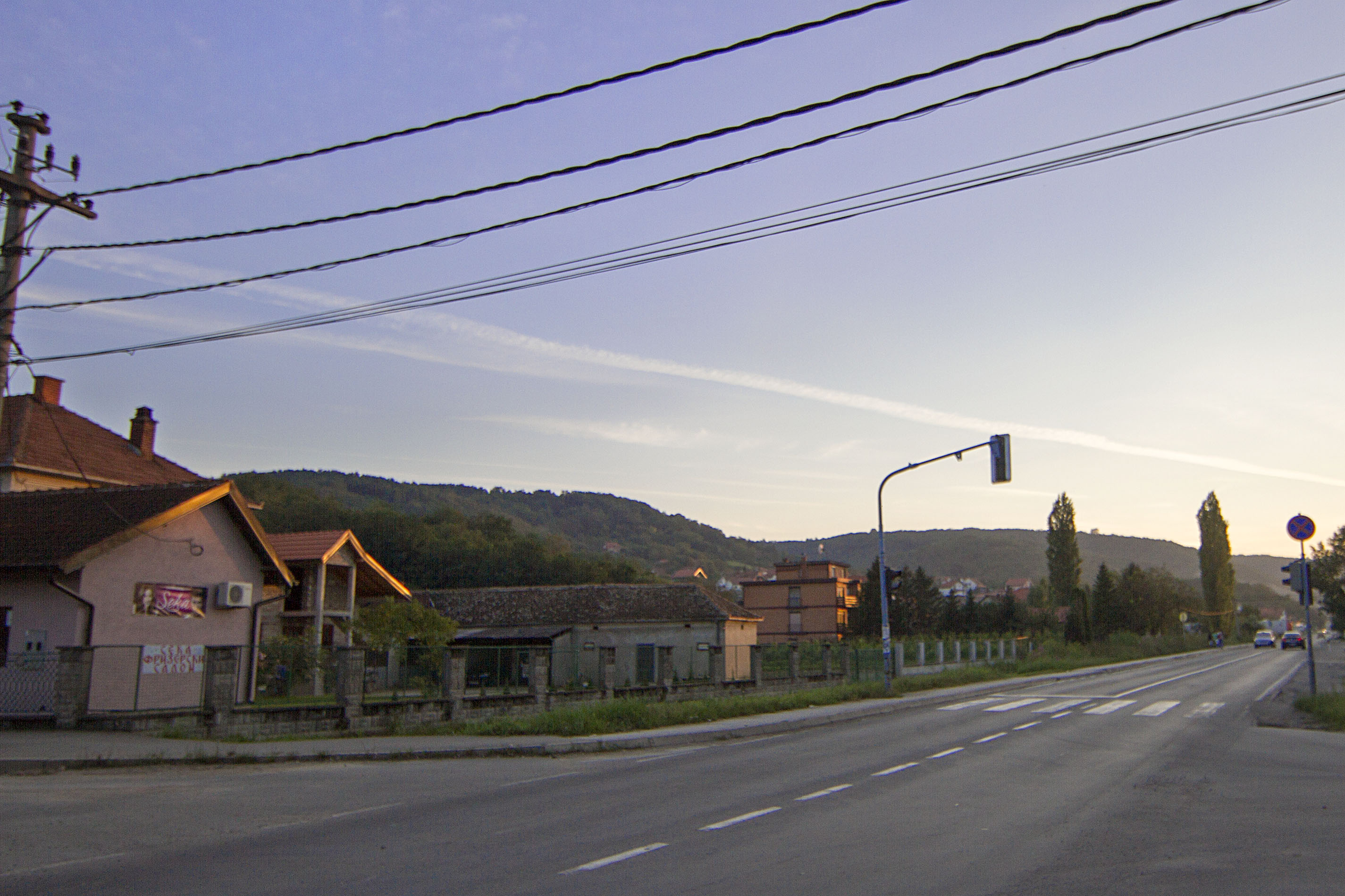 Лештане, центар